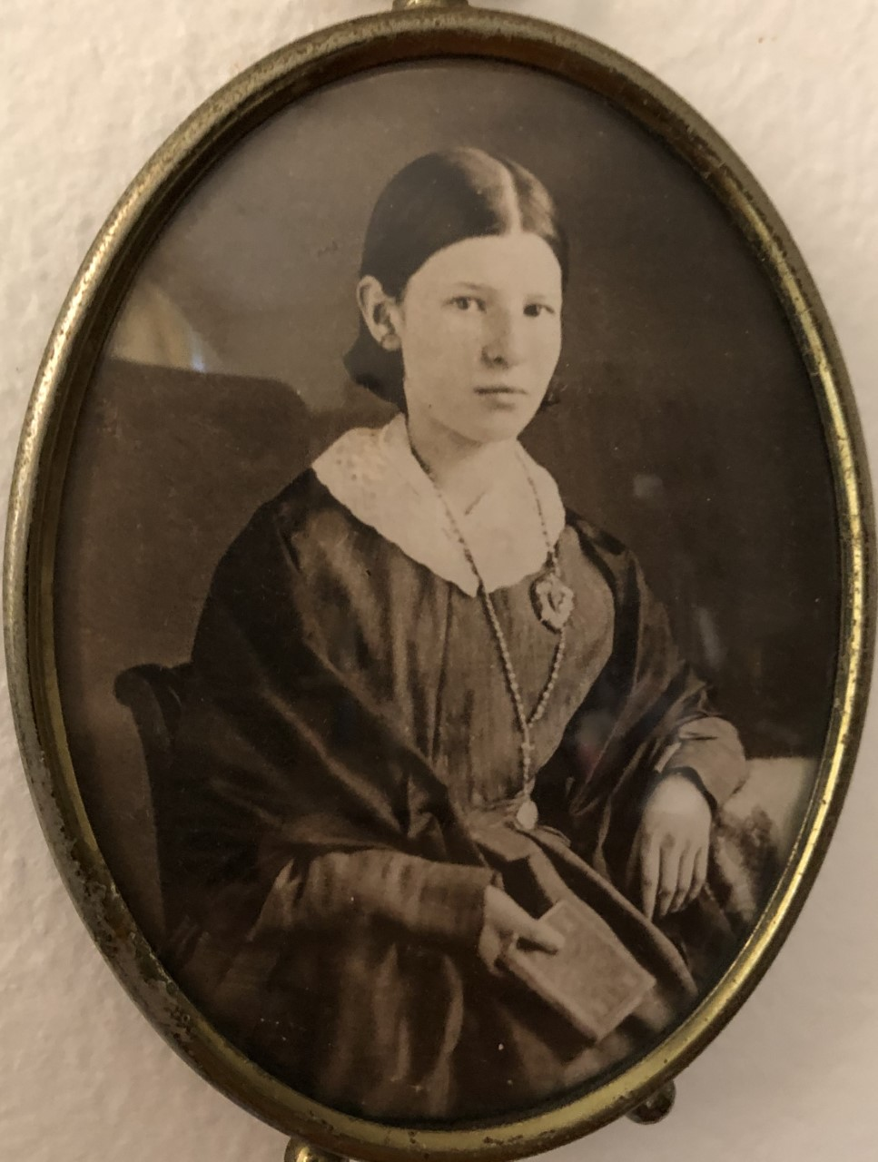 Foto a partir de un daguerrotipo de Margarita Diez-Colunje y Pombo